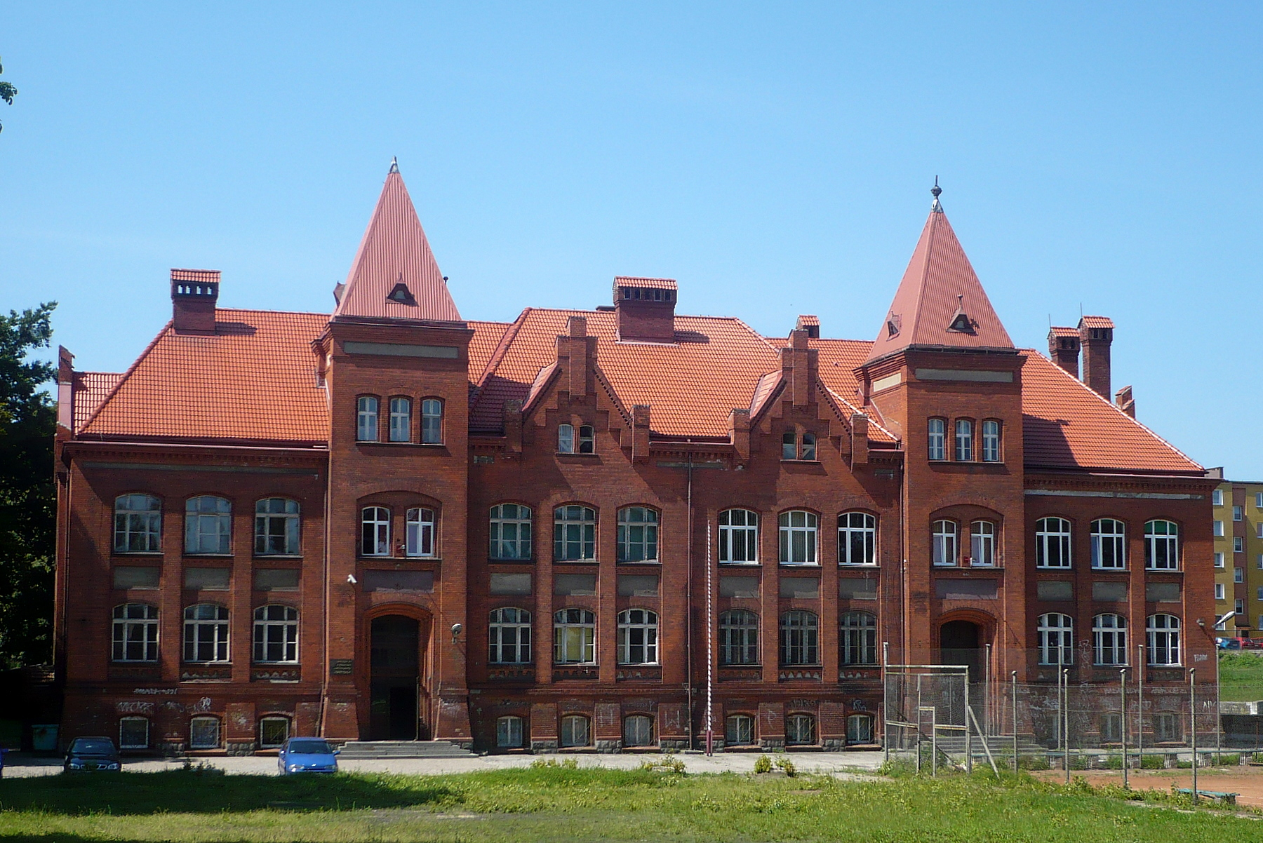 Gryfice, ul. Marszałka Jóżefa Piłsudskiego 1 - Gimnazjum nr 1 im. Żołnierzy Armii Krajowej